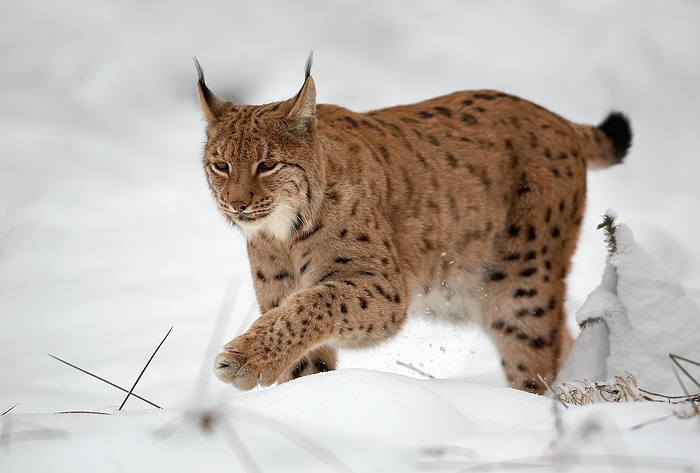 Lynx lynx, Nationalpark Bayerischer Wald, Deutschland